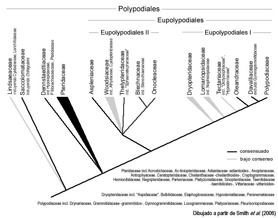 Árbol filogenético actualizado y taxonomía de Polypodiales. Dibujado a partir de Smith et al. (2006).